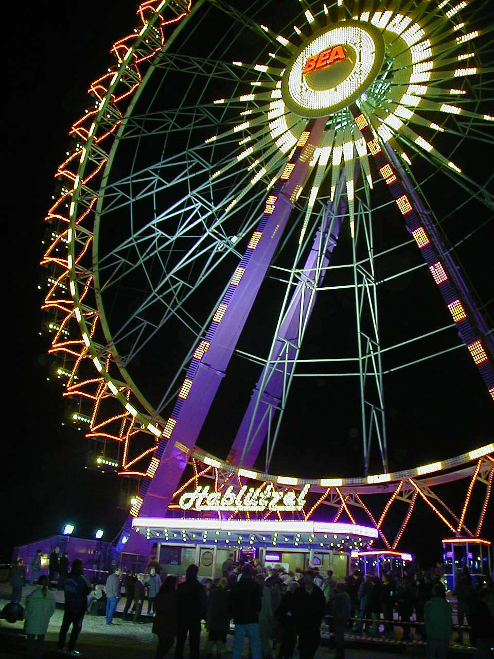 Gerstlauer Riesenrad